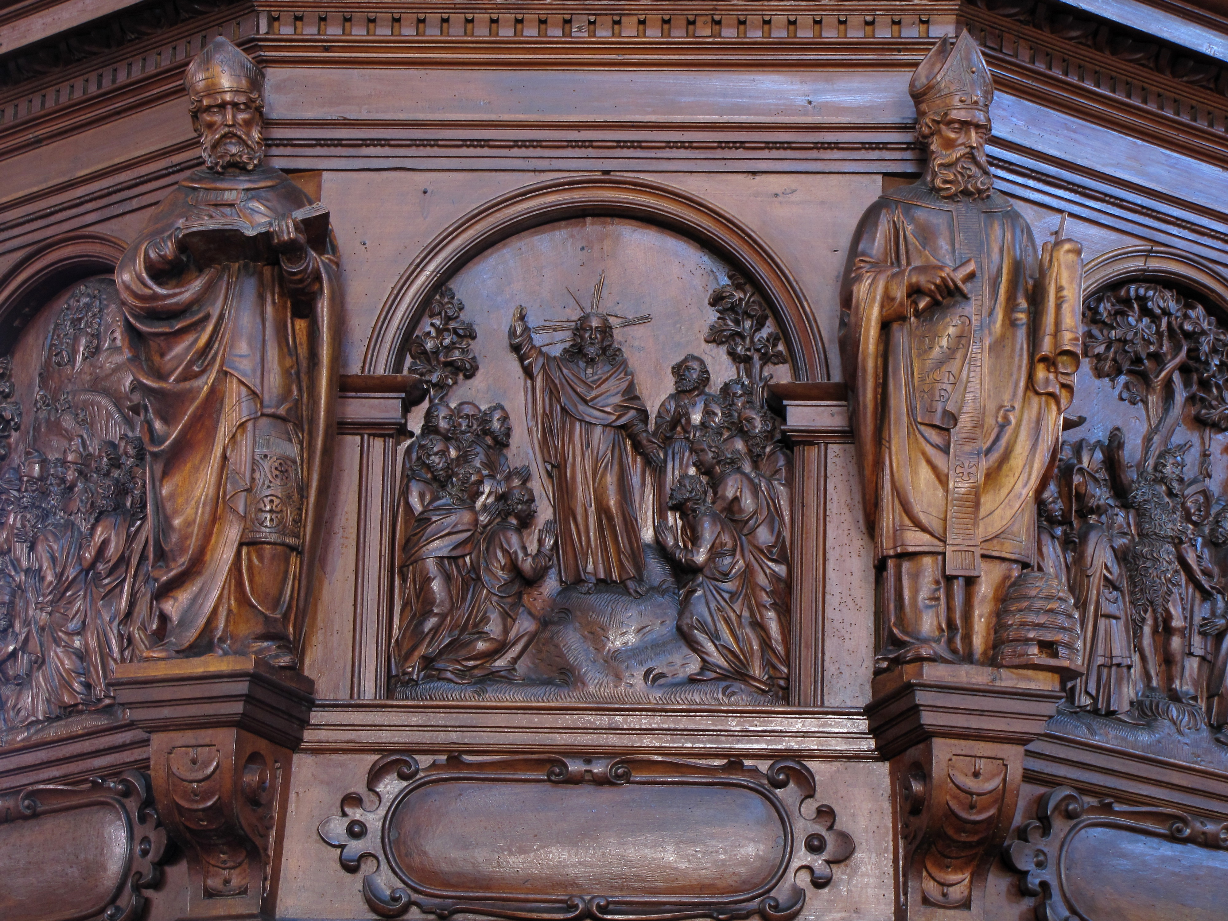 Alsace, Bas-Rhin, Église Saint-Georges de Molsheim, ancienne église des Jésuites (1618) (PA00084798, IA67006097). Chaire à prêcher (1631): Statues de Pères de l'église (St-Augustin, St-Ambroise), Relief "Sermon sur la montagne". This object is classé Monument Historique in the base Palissy, database of the French furniture patrimony of the French ministry of culture, under the references PM67000752 and IM67009672.